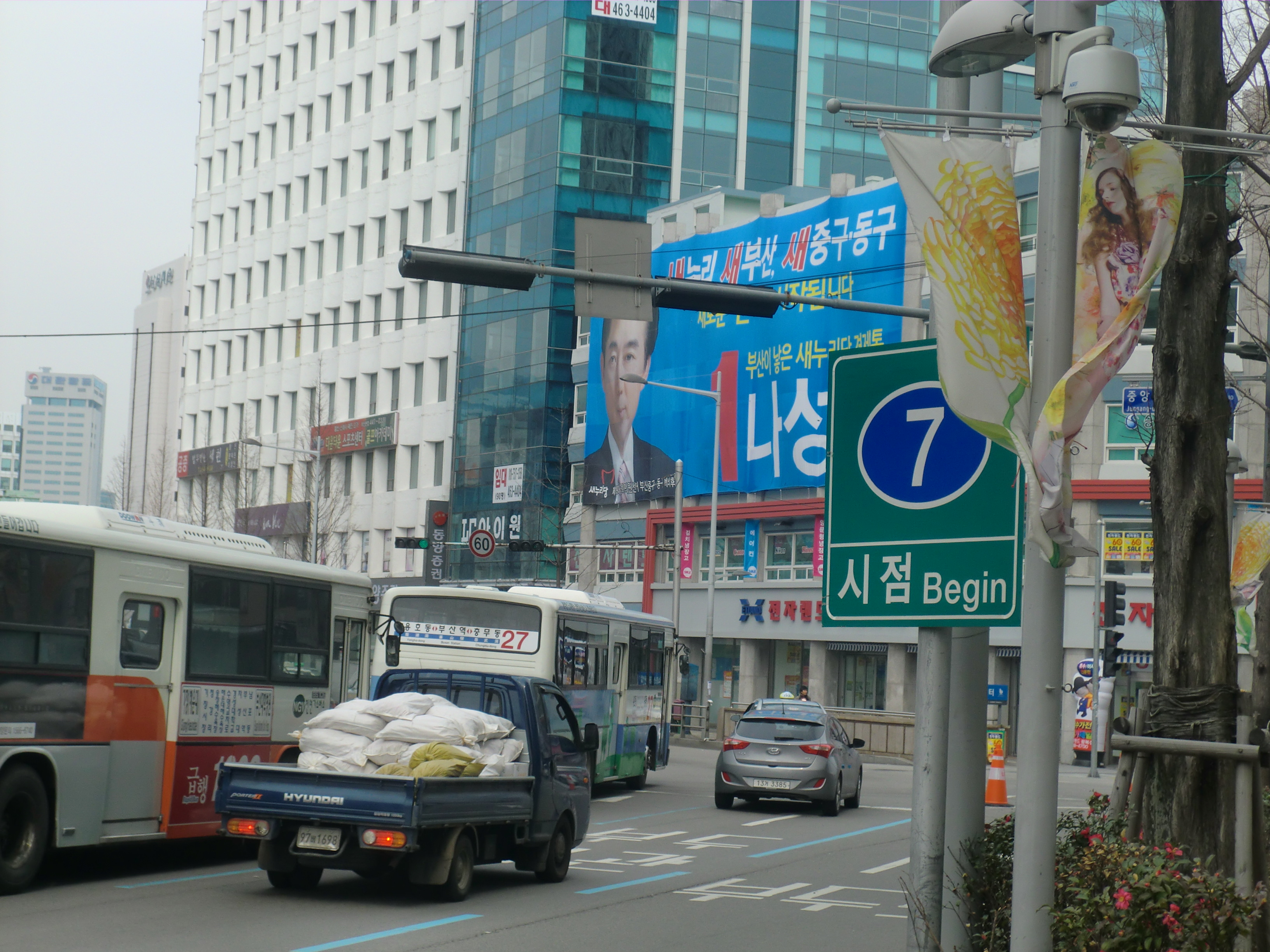 부산광역시 중구에 있는 국도7호선 시점